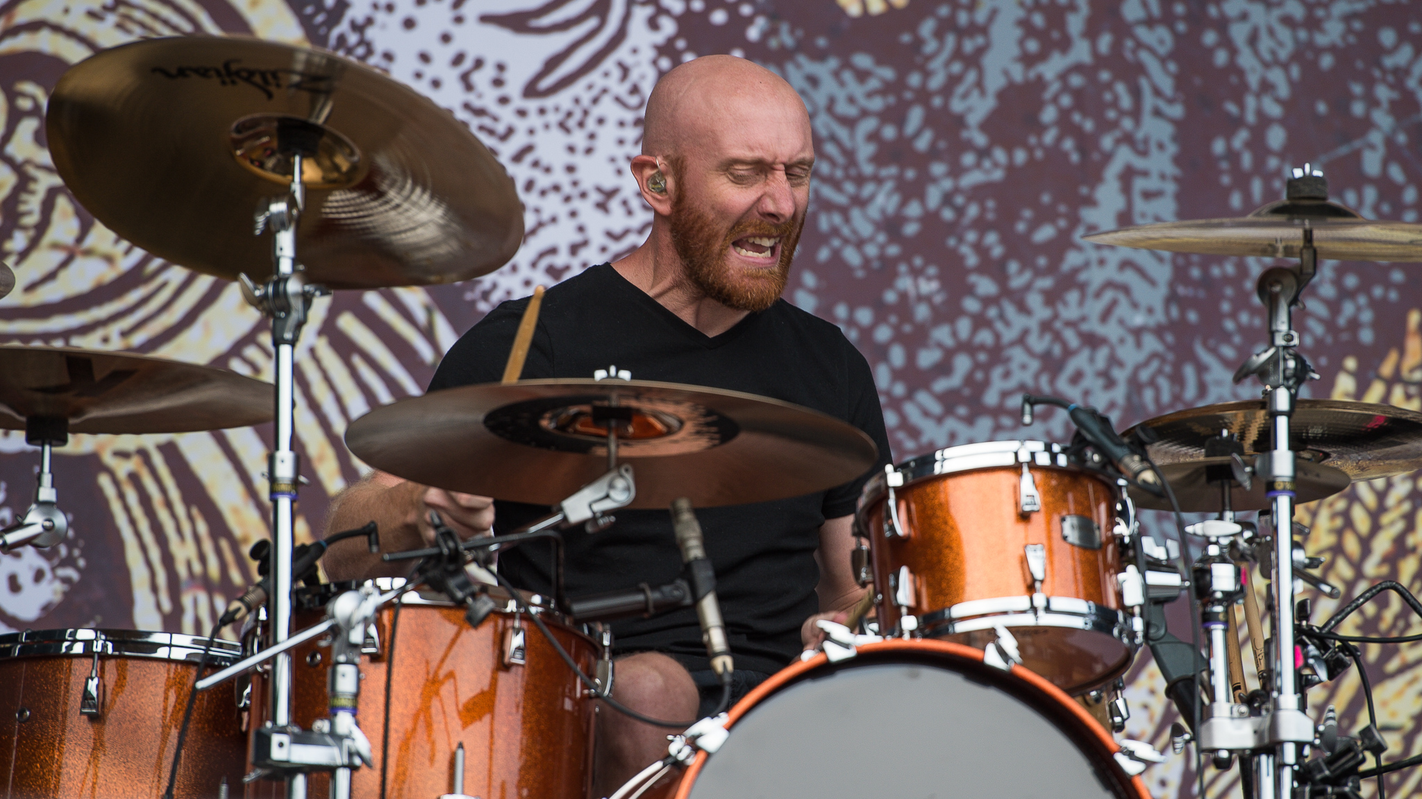 ARGO-Konzerte,Beck's Park Stage,Festival,Justin Foley,Killswitch Engage,Konzert,Livekonzert,Livemusik,Musik,RiP,Rock im Park 2016